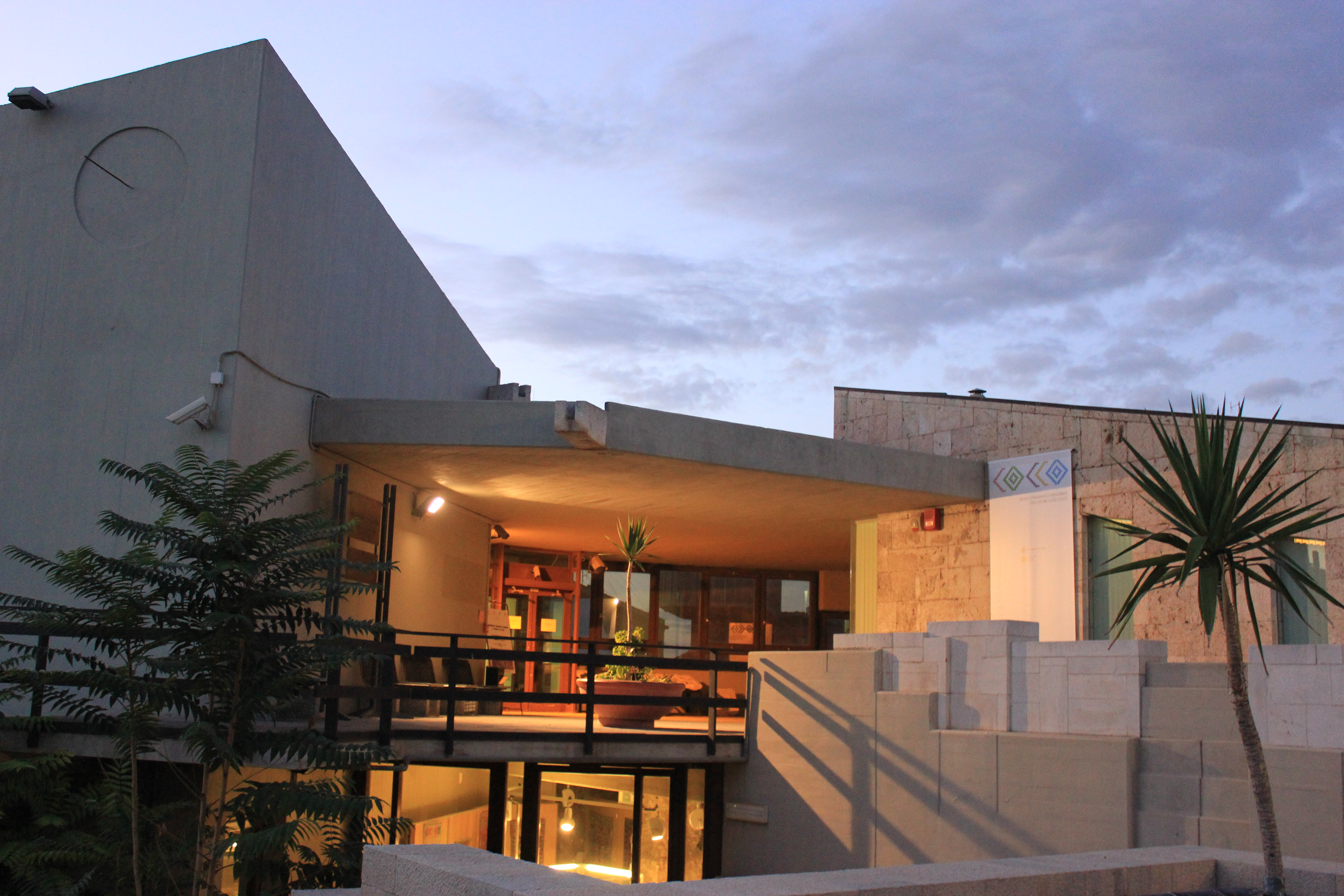 Pinacoteca nazionale - MIBAC This is a photo of a monument which is part of cultural heritage of Italy.